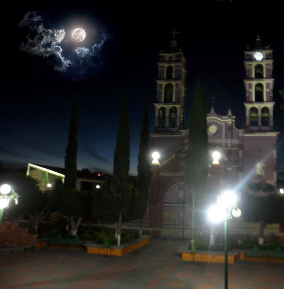 Vista nocturna de la Parroquia Jesús de las Maravillas, ubicada en el centro de Palmarito Tochapán, bajo el halo de la luna llena.